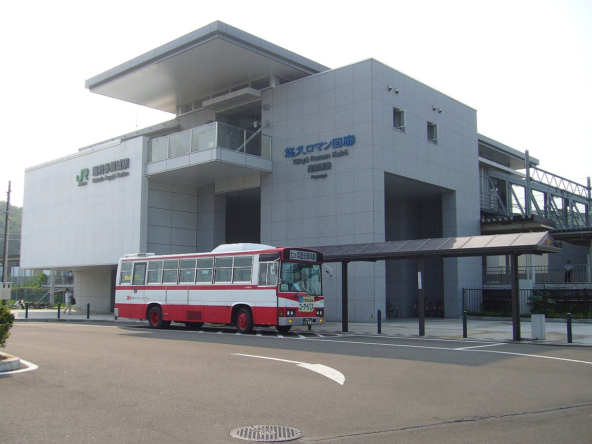 東北本線 国府多賀城駅 駅舎